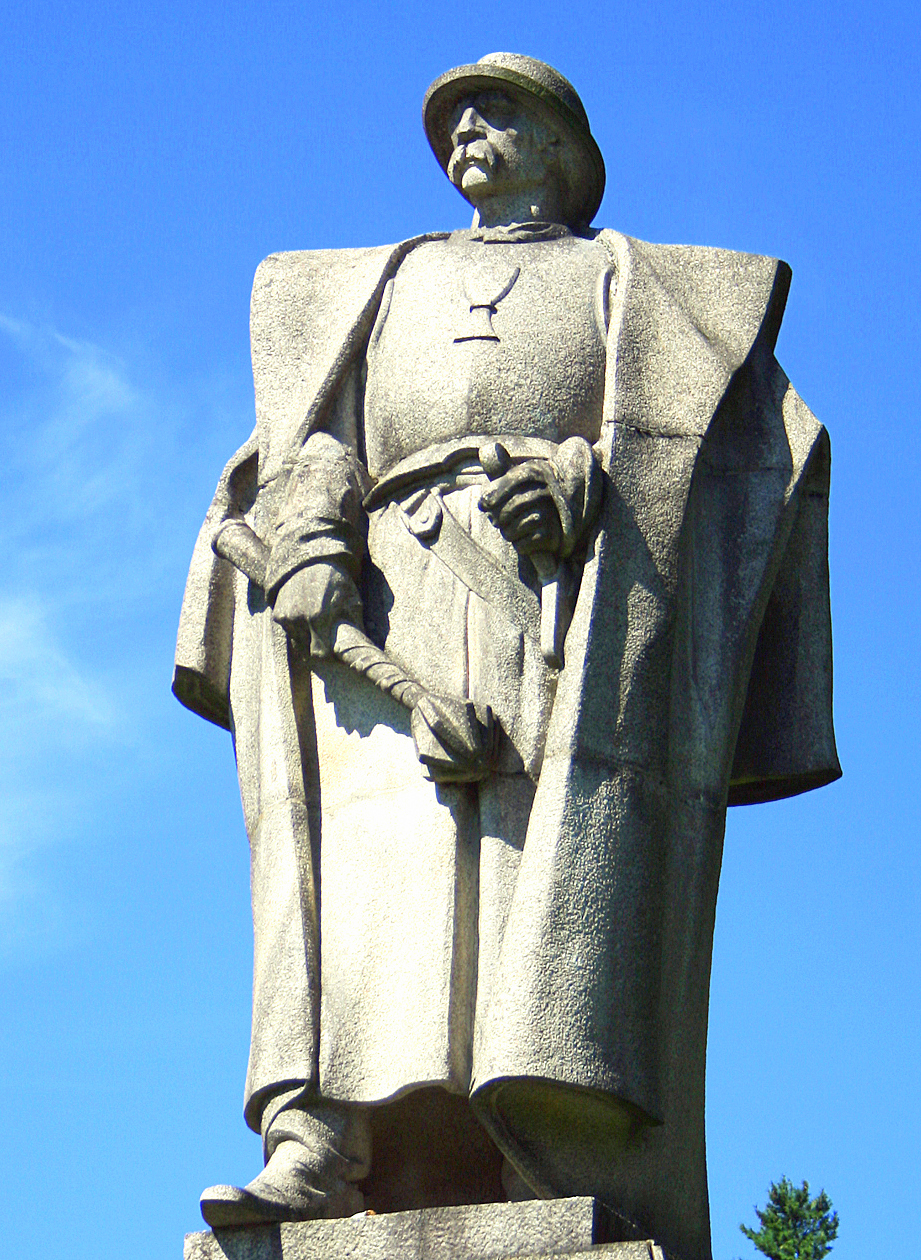 Vojvodca Jan Žižka z Trocnova. Socha v blízkosti Trocnova, južné Čechy. Autor sochy: akademický sochár Josef Malejovský (liberecka žula), r. 1960.